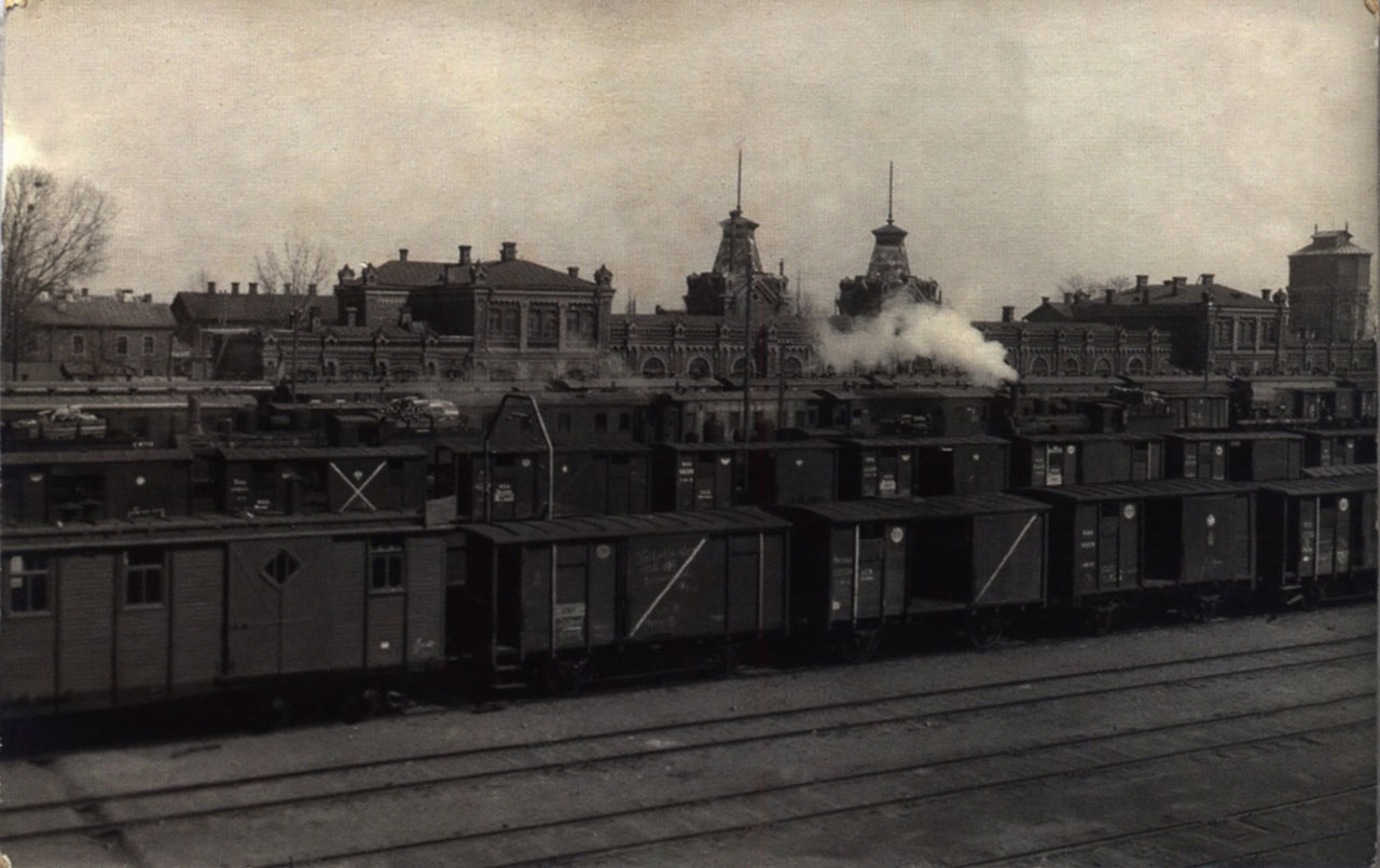 Беларуская (тарашкевіца): Менск (Miensk), Віленскі вакзал з боку Уборак (Uborki)